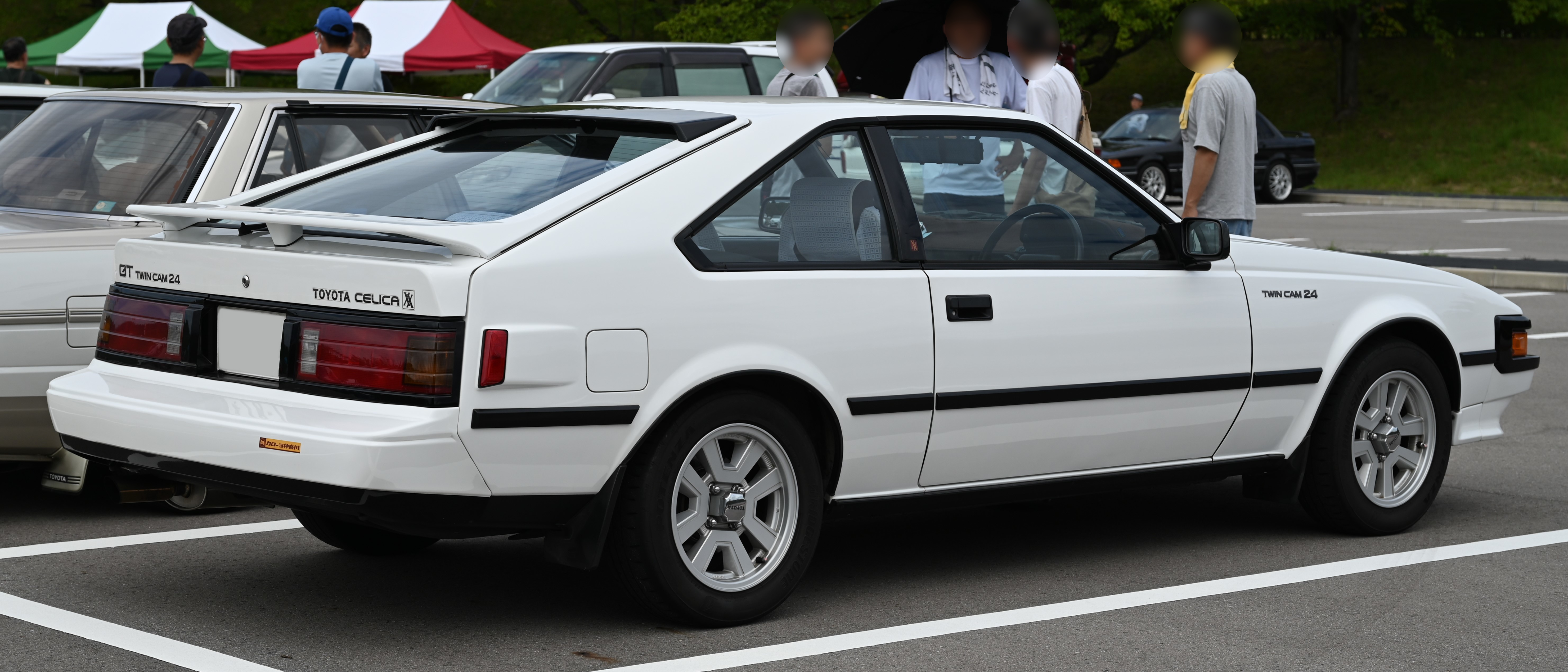 Toyota GA61